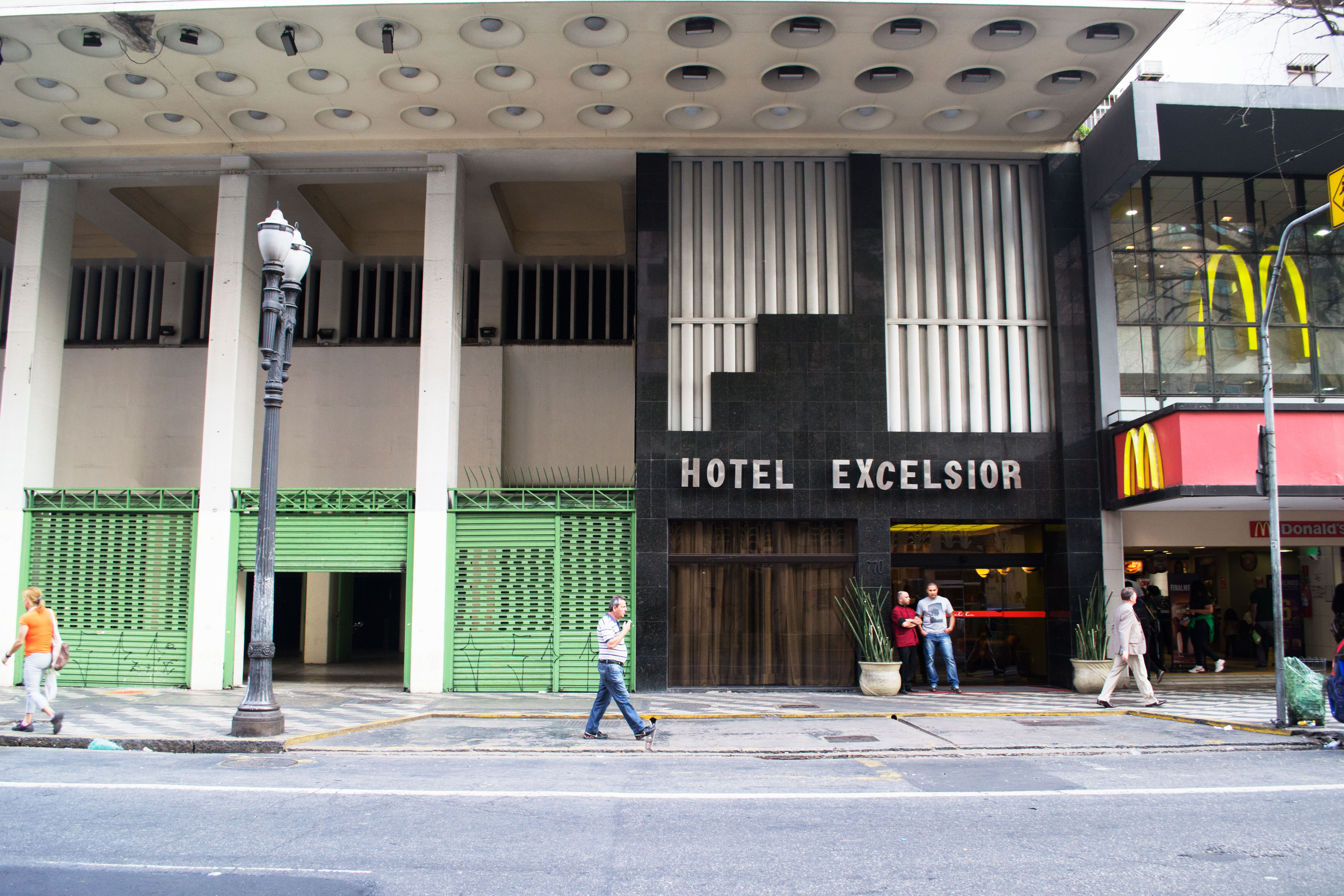 Fachada completa do Hotel Excelsior Ipiranga, São Paulo (SP), Brasil